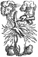 Druckermarke der Schwabe AG